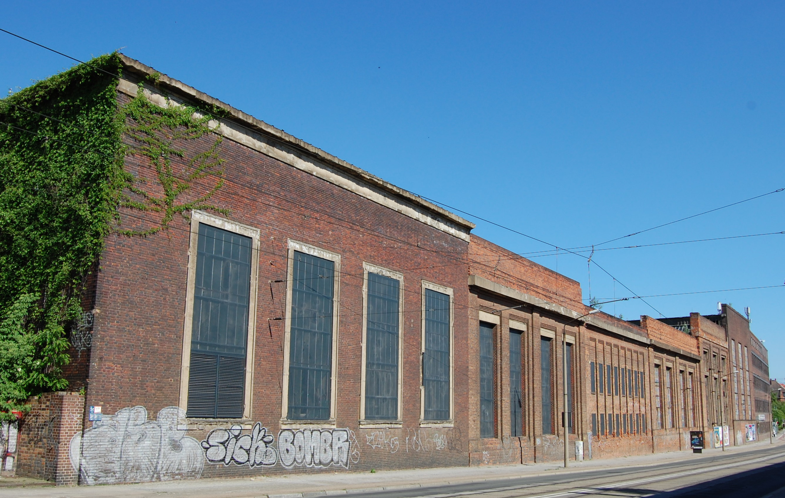 Gebäudefront der ehemaligen Maschinenfabrik Buckau zur Schönebecker Straße, Blick von Norden